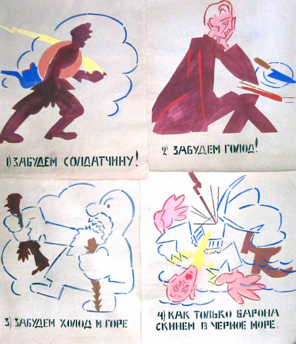 1.Забудем солдатчину! 2.Забудем голод! 3.Забудем холод и горе 4.Как только барона скинем в Черное море! Издательство: РОСТА. Серия: Окна РОСТА № 426. Место публикации: Москва. Техника исполнения: Трафарет. Размер: 108 х 94. Плакат состоит из 4-х панелей, каждая панель 54 x 47.